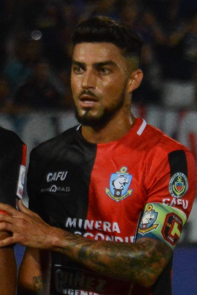 Universidad de Chile v Deportes Antofagasta, Estadio Nacional, Santiago, Chile.